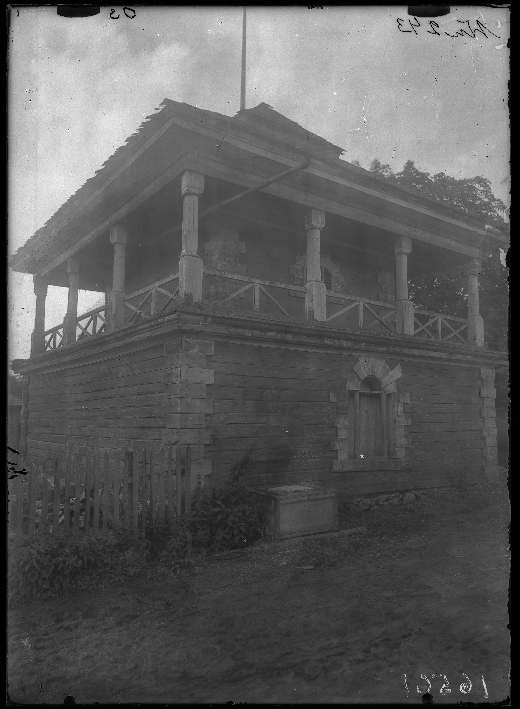 Беларуская (тарашкевіца): Камянпольле (Kamianpolle), сядзіба Мірскіх (Mirski). Лямус